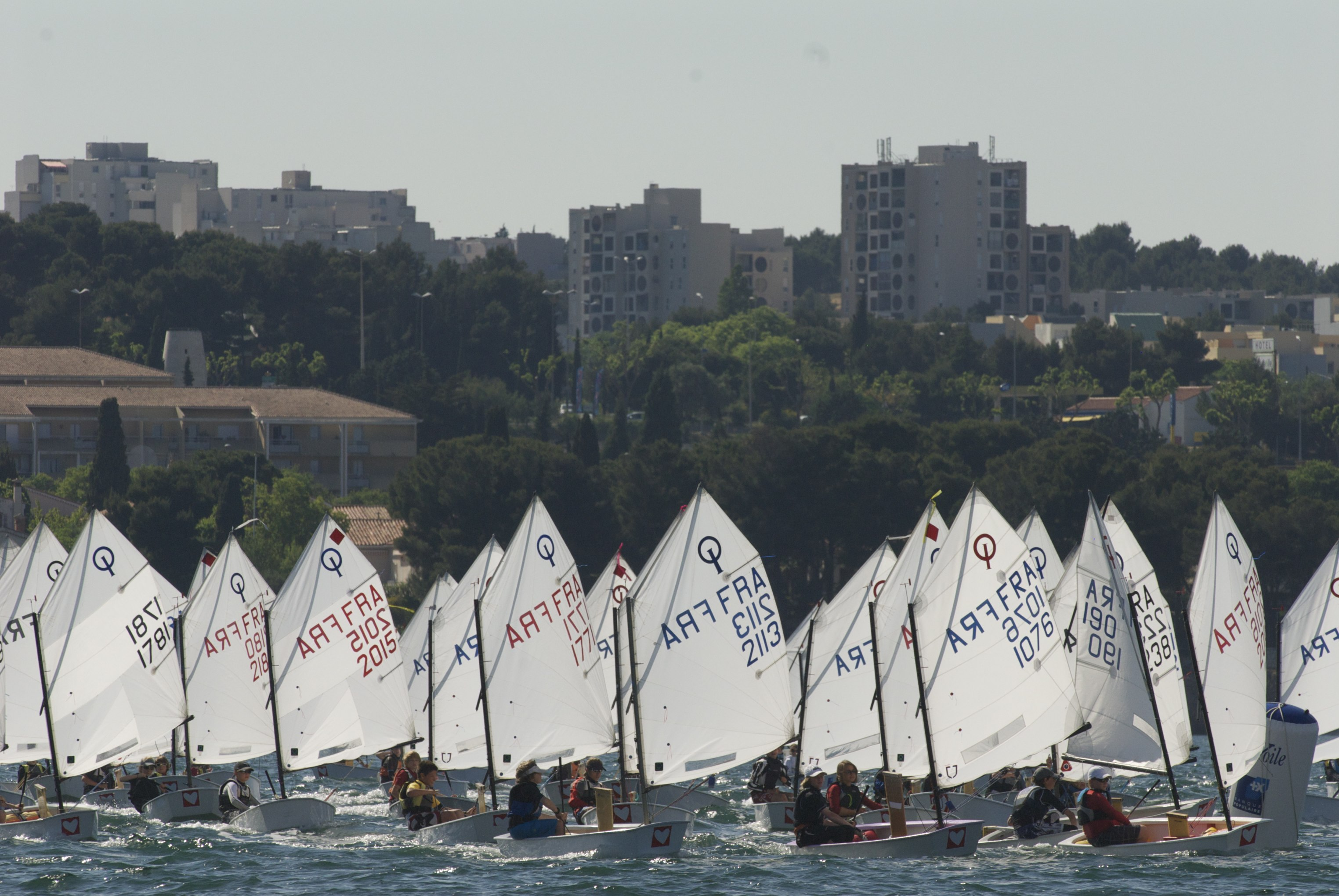 Photo prise lors d'une régate de ligue PACA optimist en mai 2011 à Martigues (13).